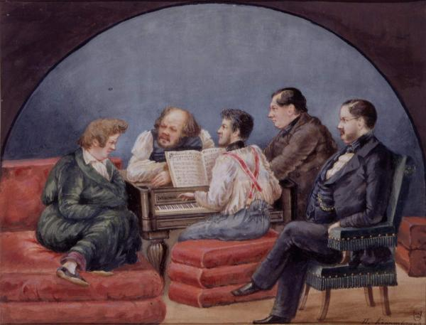 Каратыгин Пётр Андреевич - Собрание брюлловского кружка: К. П. Брюллов, Я. Ф. Яненко, М. И. Глинка, Н. В. Кукольник и И. П. Поливанов